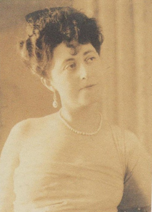 Photographie d'Anna Margoulis-Némirovsky, reproduite dans Irène Némirovsky, un destin en images, Olivier Corpet (dir.), Paris, Denoël, 2010.